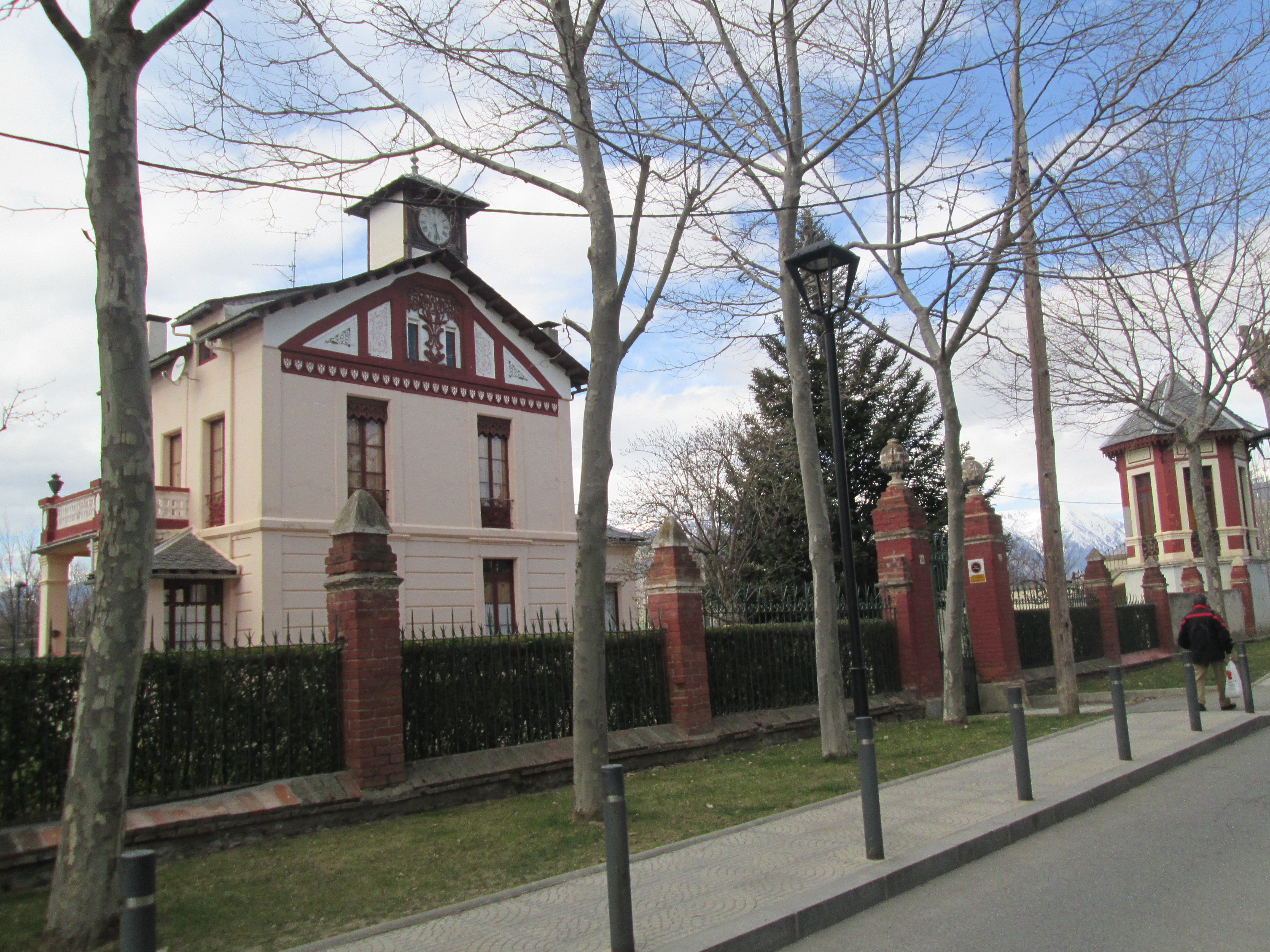 llac març 2014